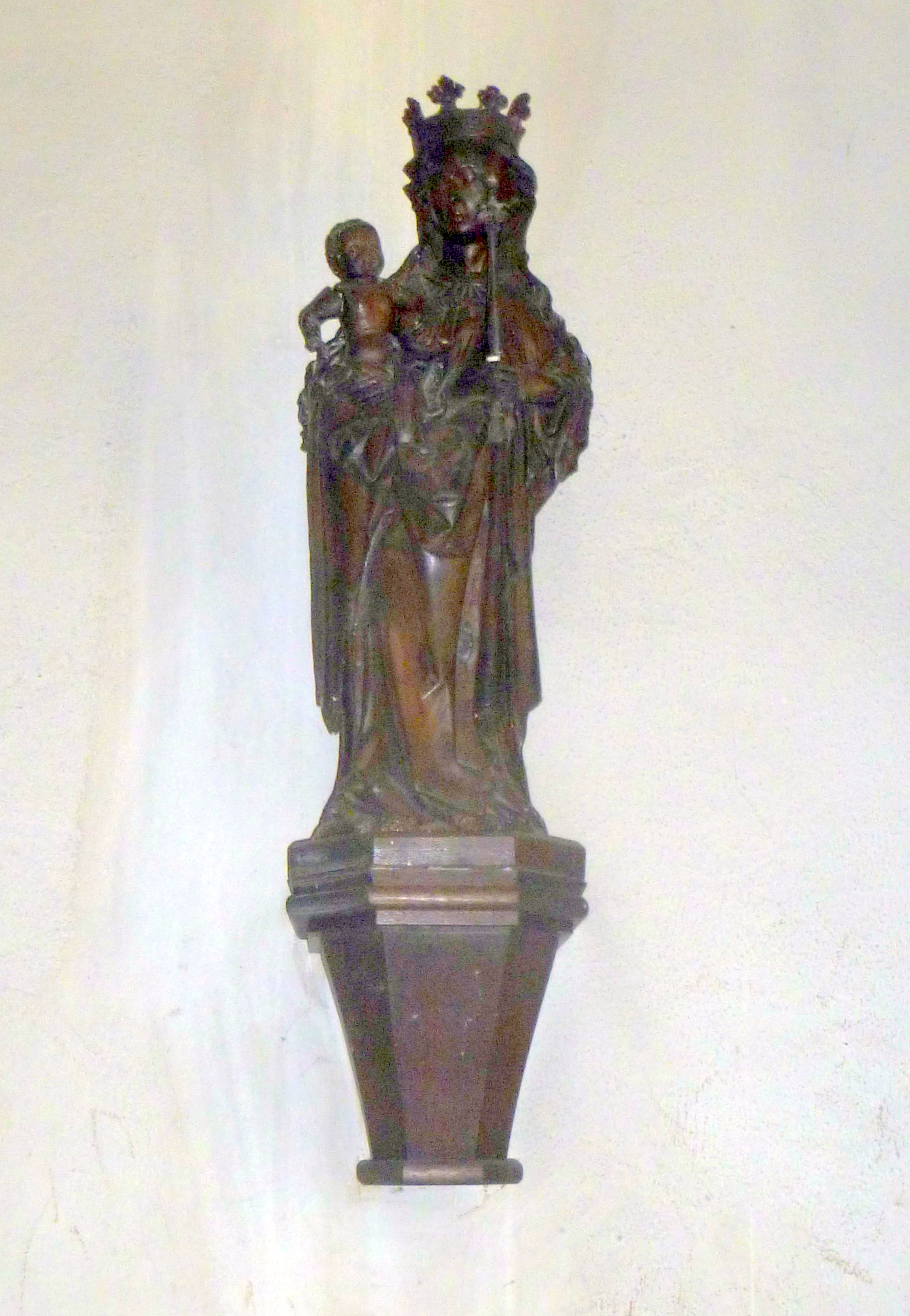 Marienstatue mater salvatoris in der Salvatorkiche zu Aachen